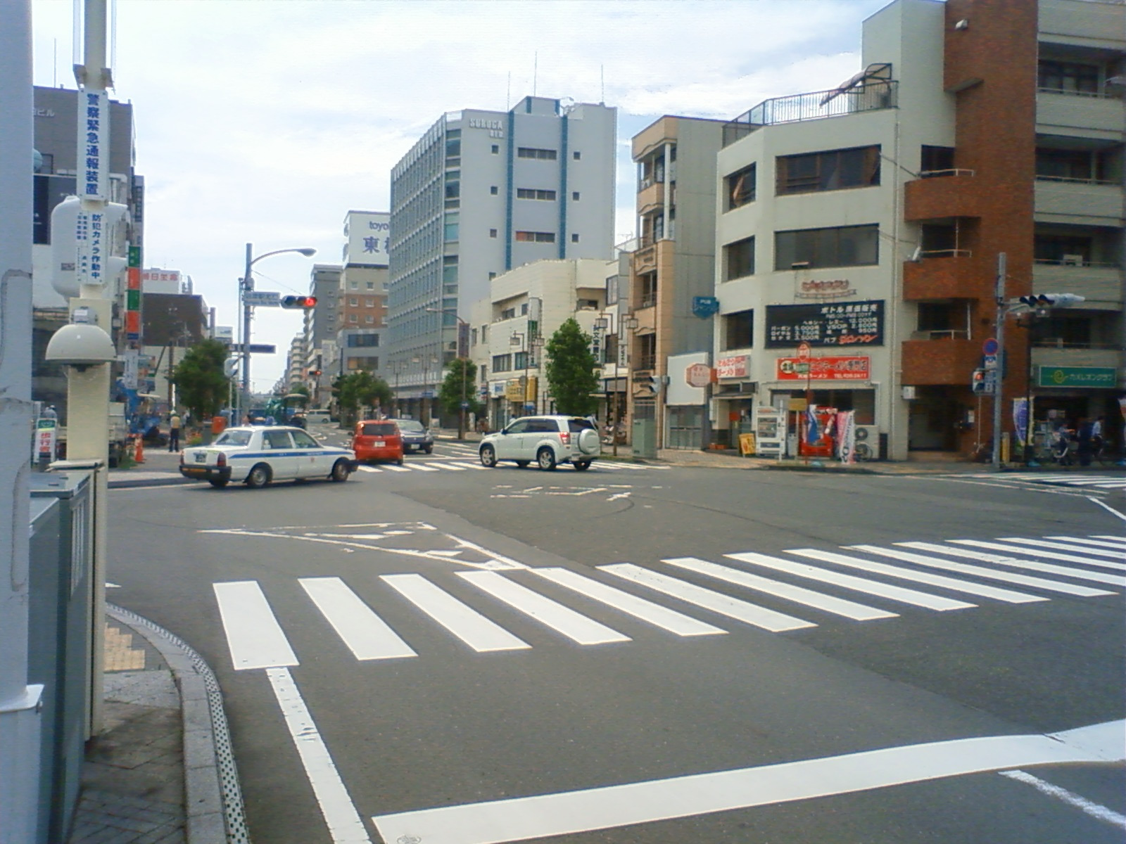 高島町 沼津駅北口